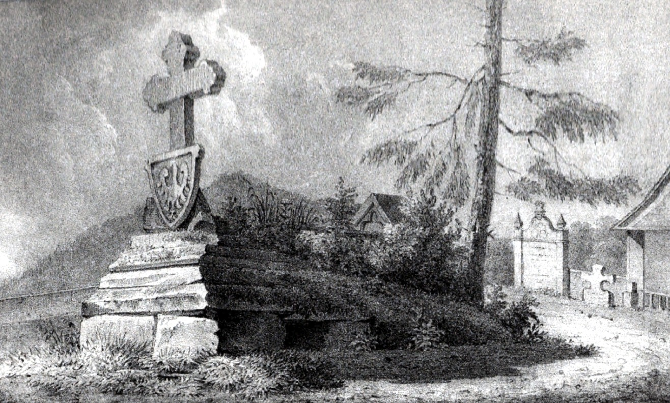 Lithographie des Grabmals von Egino I. Graf von Freiburg (bis 1829 auf dem Gelände des Klosters Tennenbach); Beschreibung und Geschichte siehe Anna Kempf: Die Grablege des Grafen Egino d. J. von Urach-Freiburg : eine quellenmäßige Untersuchung, In: Freiburger Diözesan-Archiv Bd. 70 (1950), S. 57-75